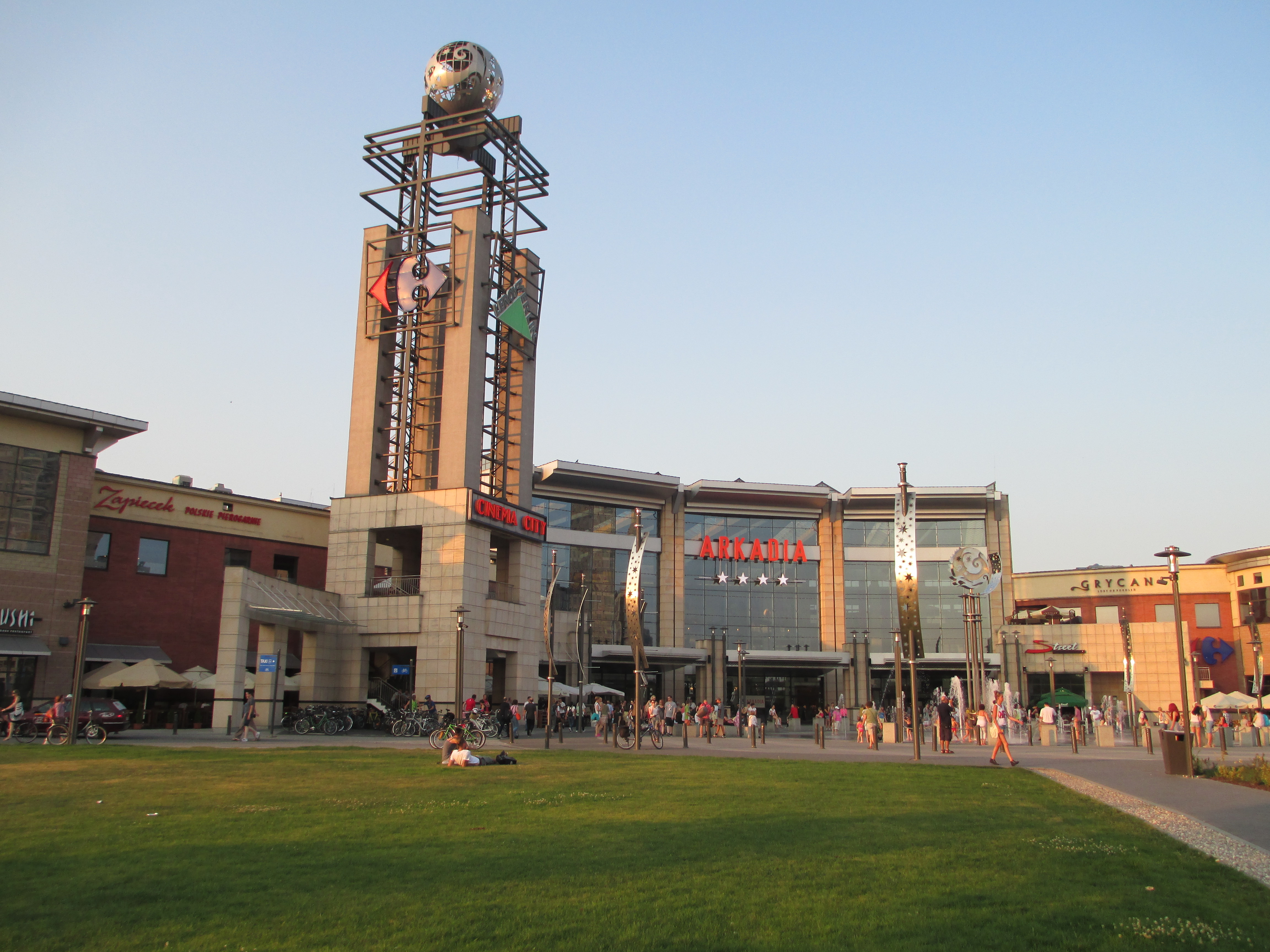 קניון ארקדיה בוורשה